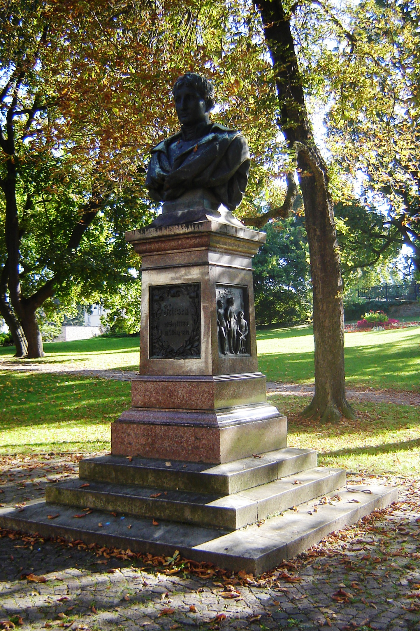 Magdeburg, Friedendenkmal